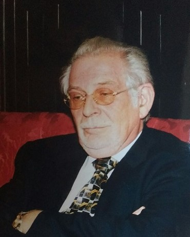 Porträtfotografie von Klaus Wagner (Philologe)